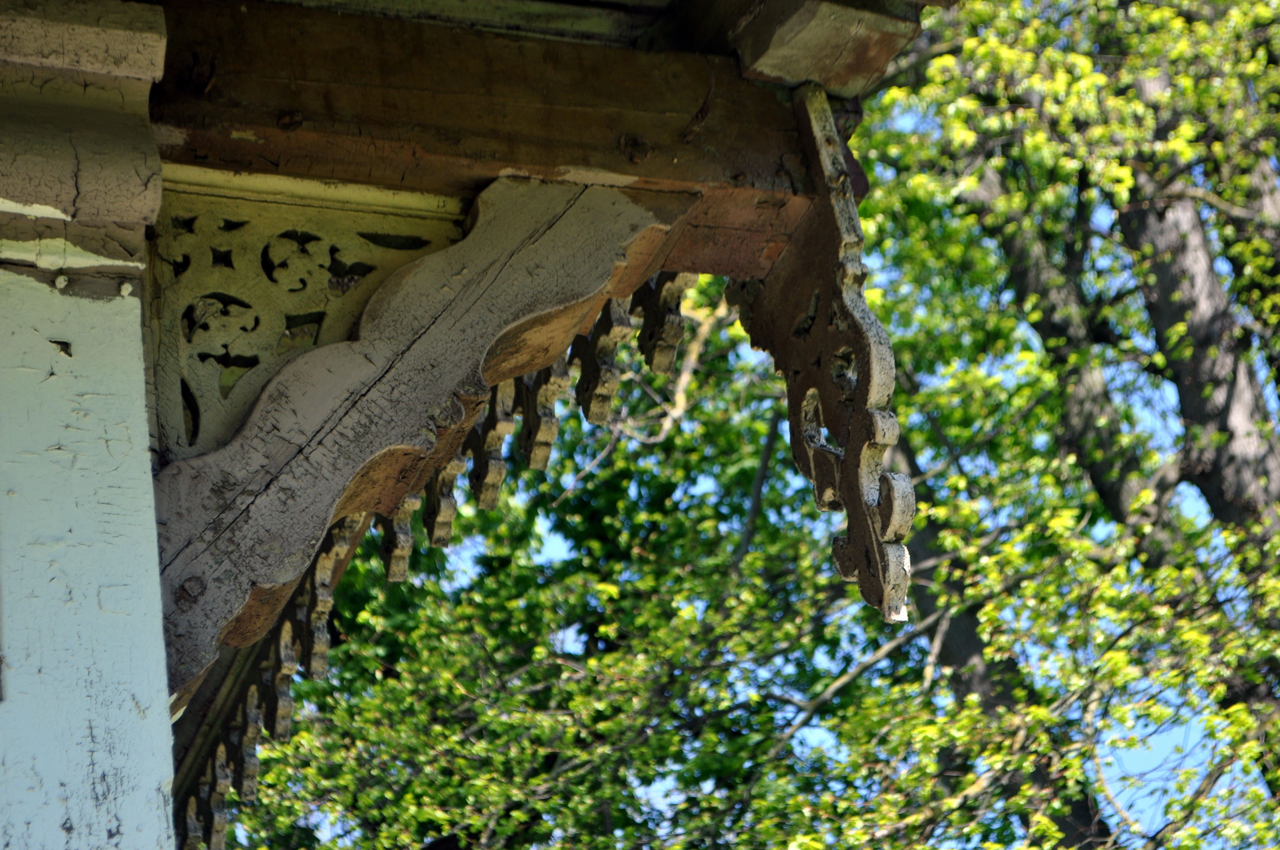 Das Bild zeigt Haus und Grundstück Knieperdamm 5 in Stralsund am 7. Mai 2016. Das im Jahr 1850 errichtete, unter Denkmalschutz stehende, zuletzt verfallene Haus wurde am 11. November 2017 abgerissen. Auf dem Grundstück steht eine etwa 300 Jahre alte Eibe, der wahrscheinlich älteste Baum Stralsunds.